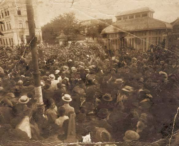 Srpskohrvatski / српскохрватски: Protest u Beogradu protiv Obznane 1920. godine